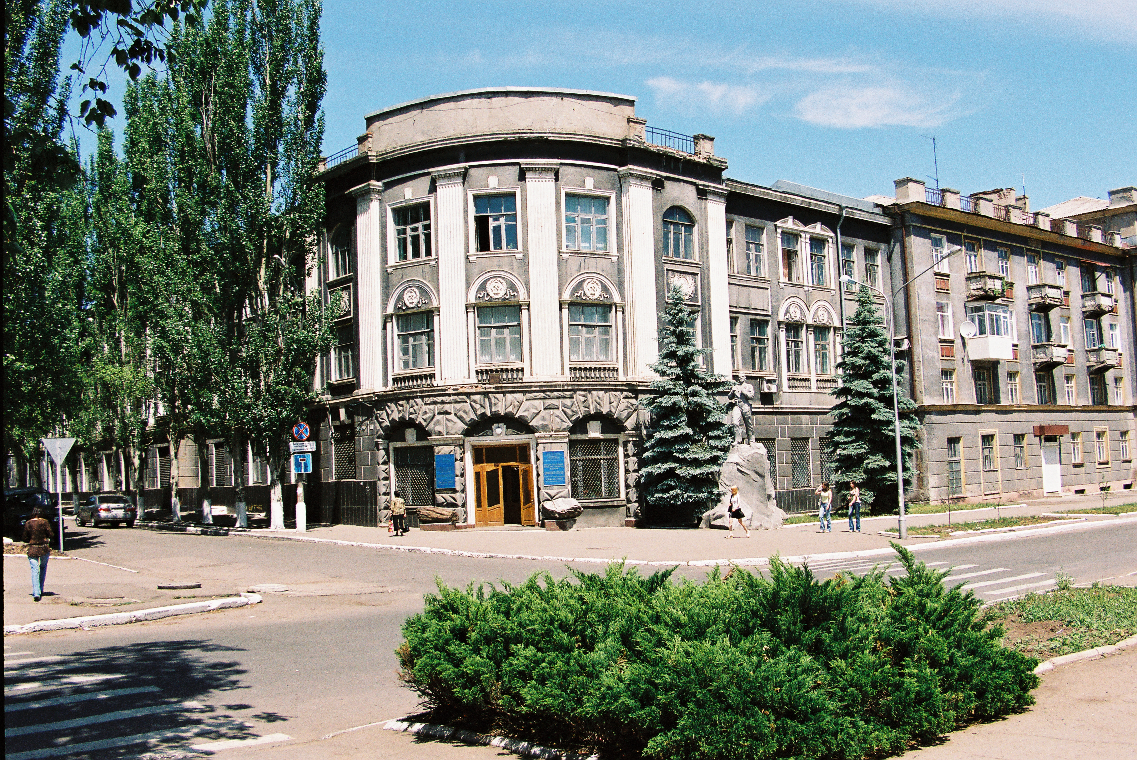 Фото Анастасии Федоренко